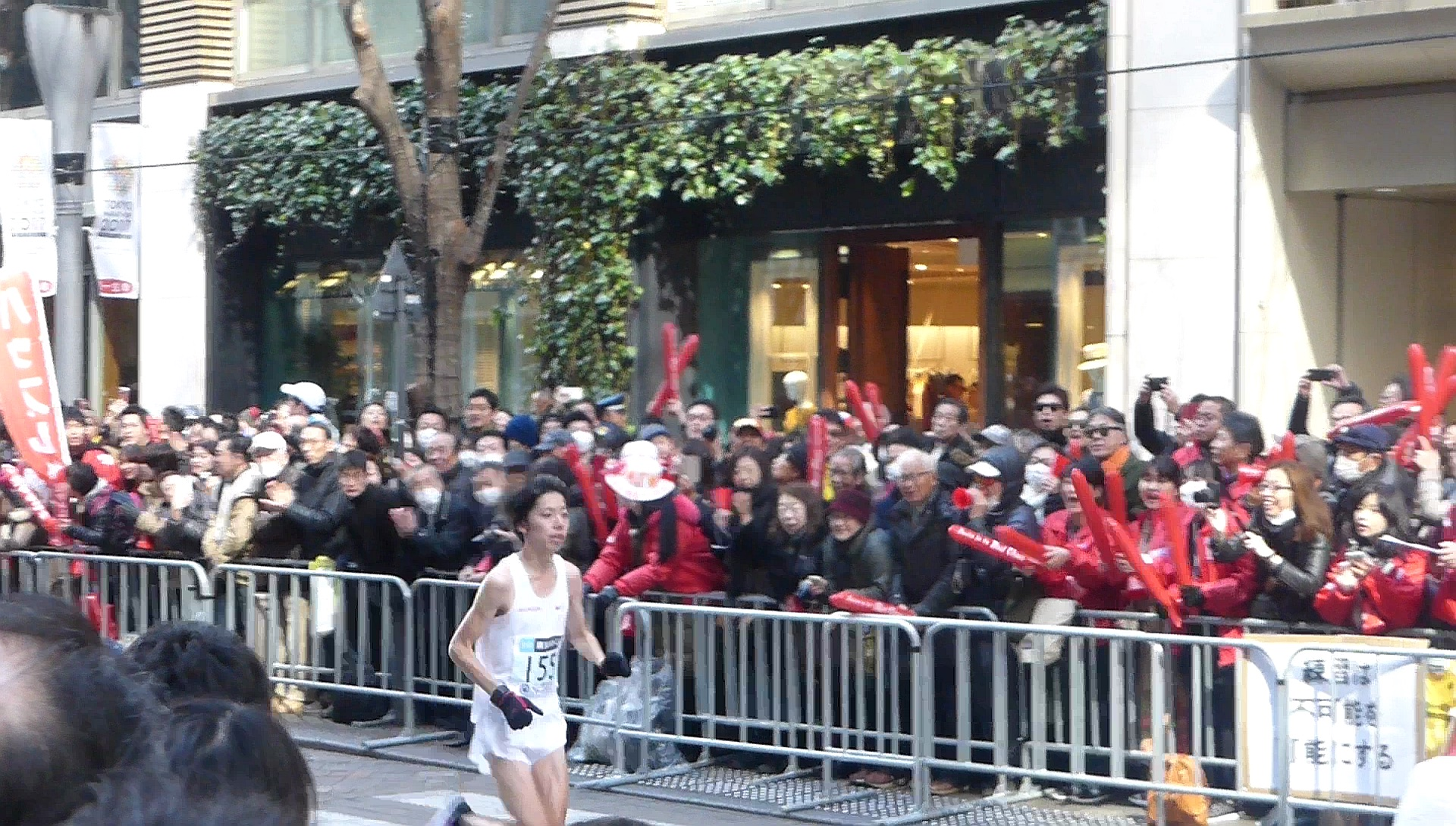 2017年東京マラソンの設楽悠太 (Yuta Shitara at 2017 Tokyo Marathon)